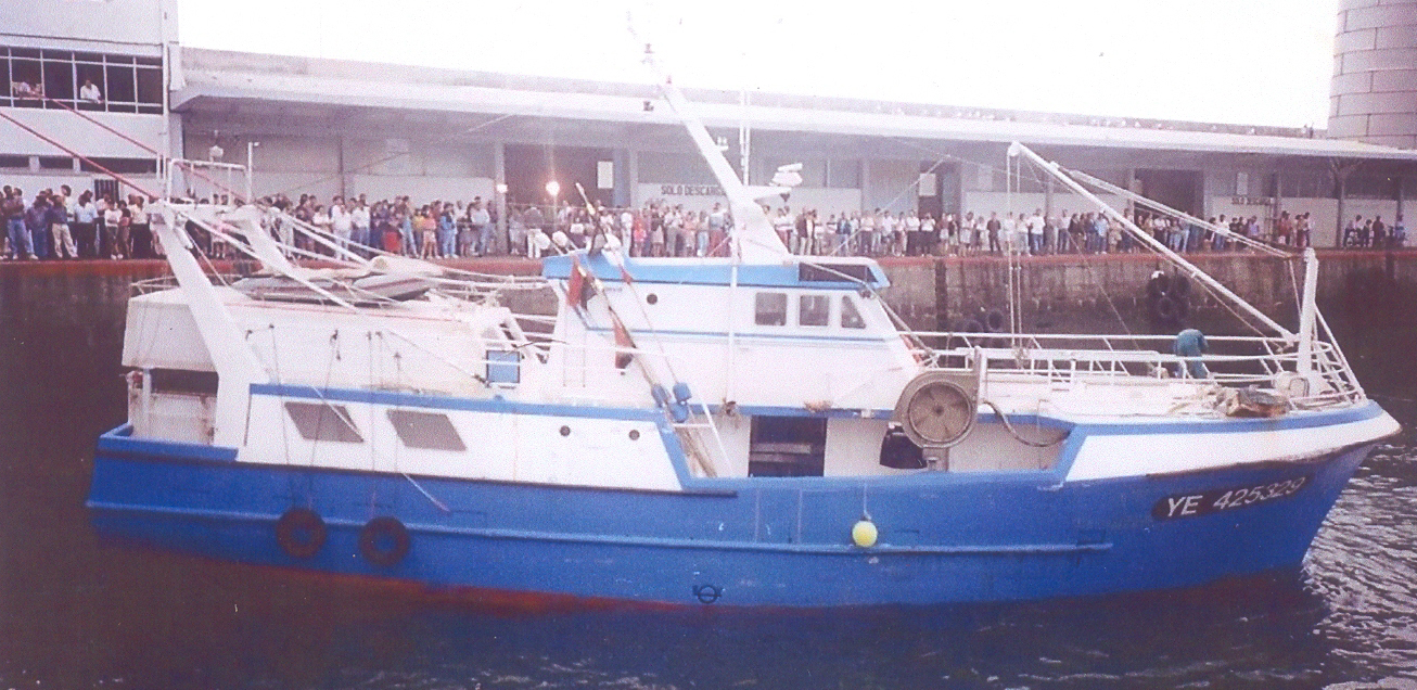 Barco francés con redes ilegales atracado en Burela durante la guerra del bonito.